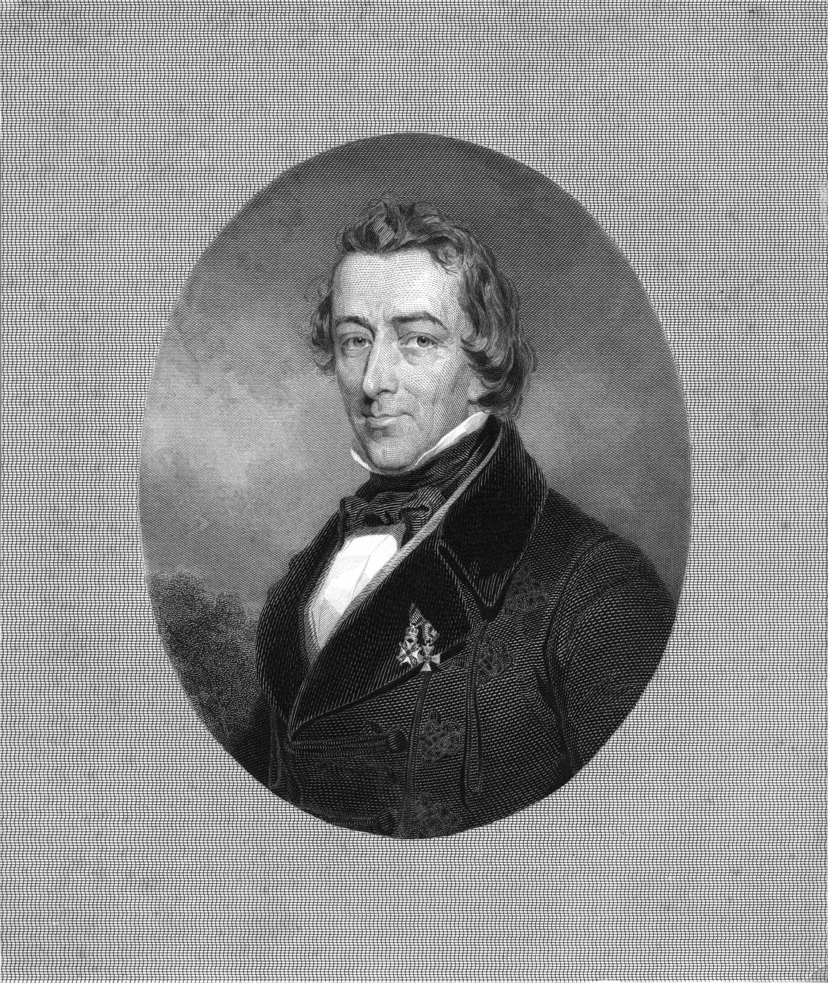 portrait gravé